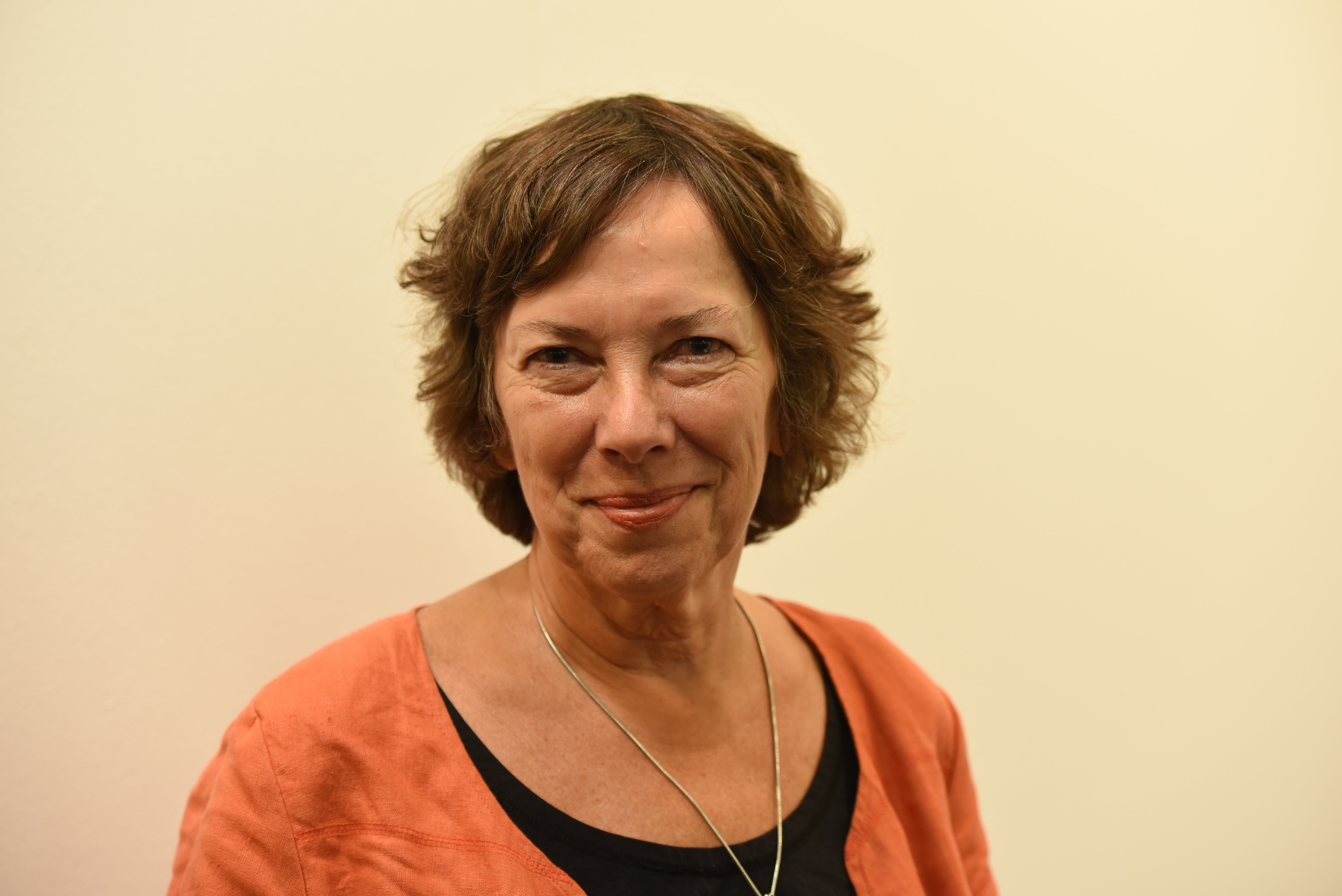 Poeten, essäisten och ledamoten av Samfundet De Nio, Nina Burton på Bokmässan i Göteborg 2017.